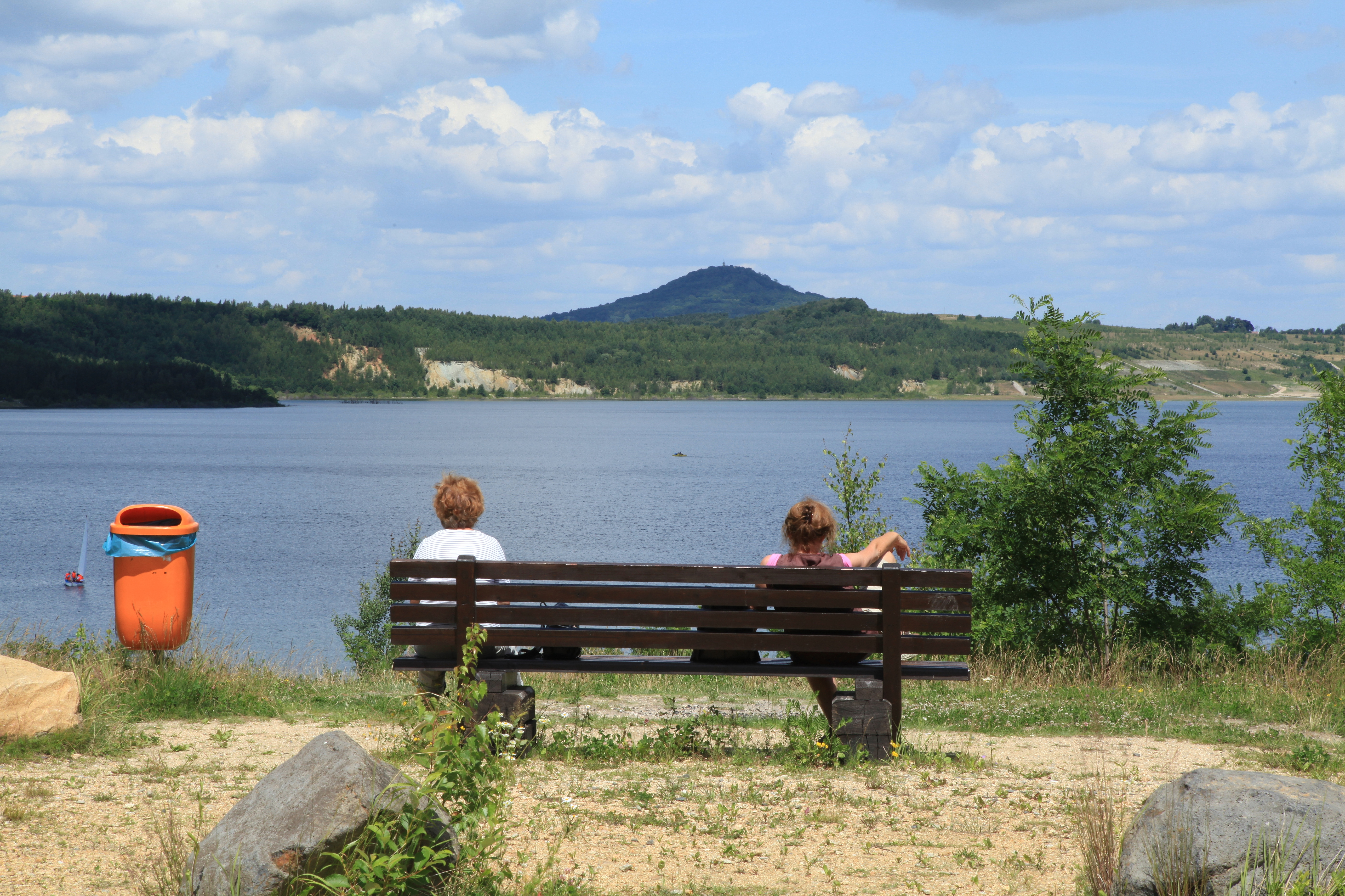 Landeskrone hinter dem Berzdorfer See in Schönau-Berzdorf